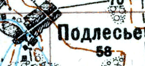 Топографическая карта Ленинградской области, квадрат VIc-28 (Луга), деревня Подлесье